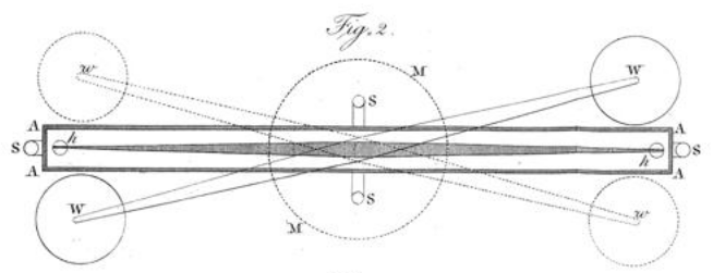 Figura 2 de l'article CAVENDISH, H. Experiments to Determine the Density of the Earth. Phil. Trans. R. Soc. Lond. January 1, 1798, 88:469-526